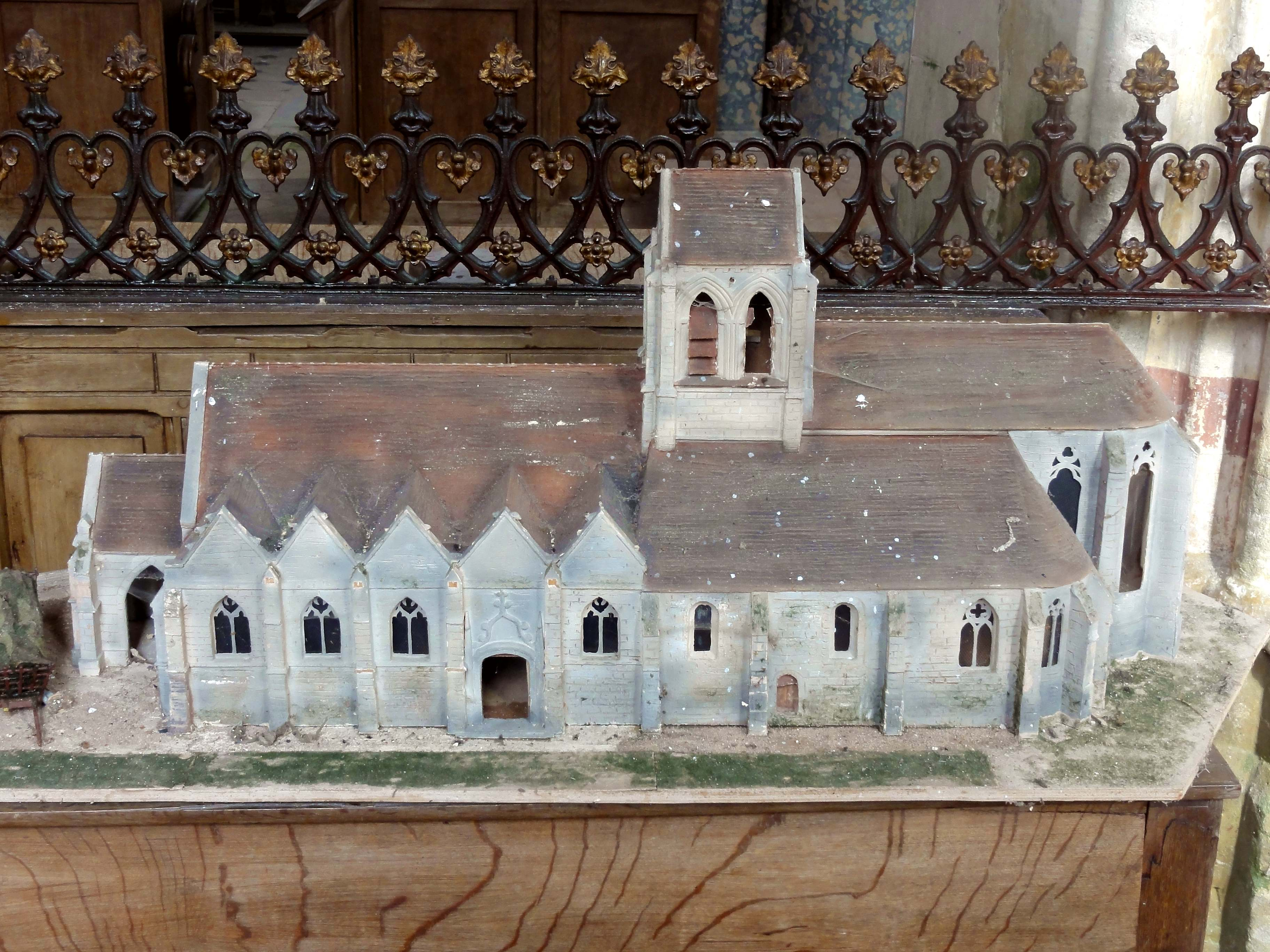 Mobilier de l'église (voir titre).